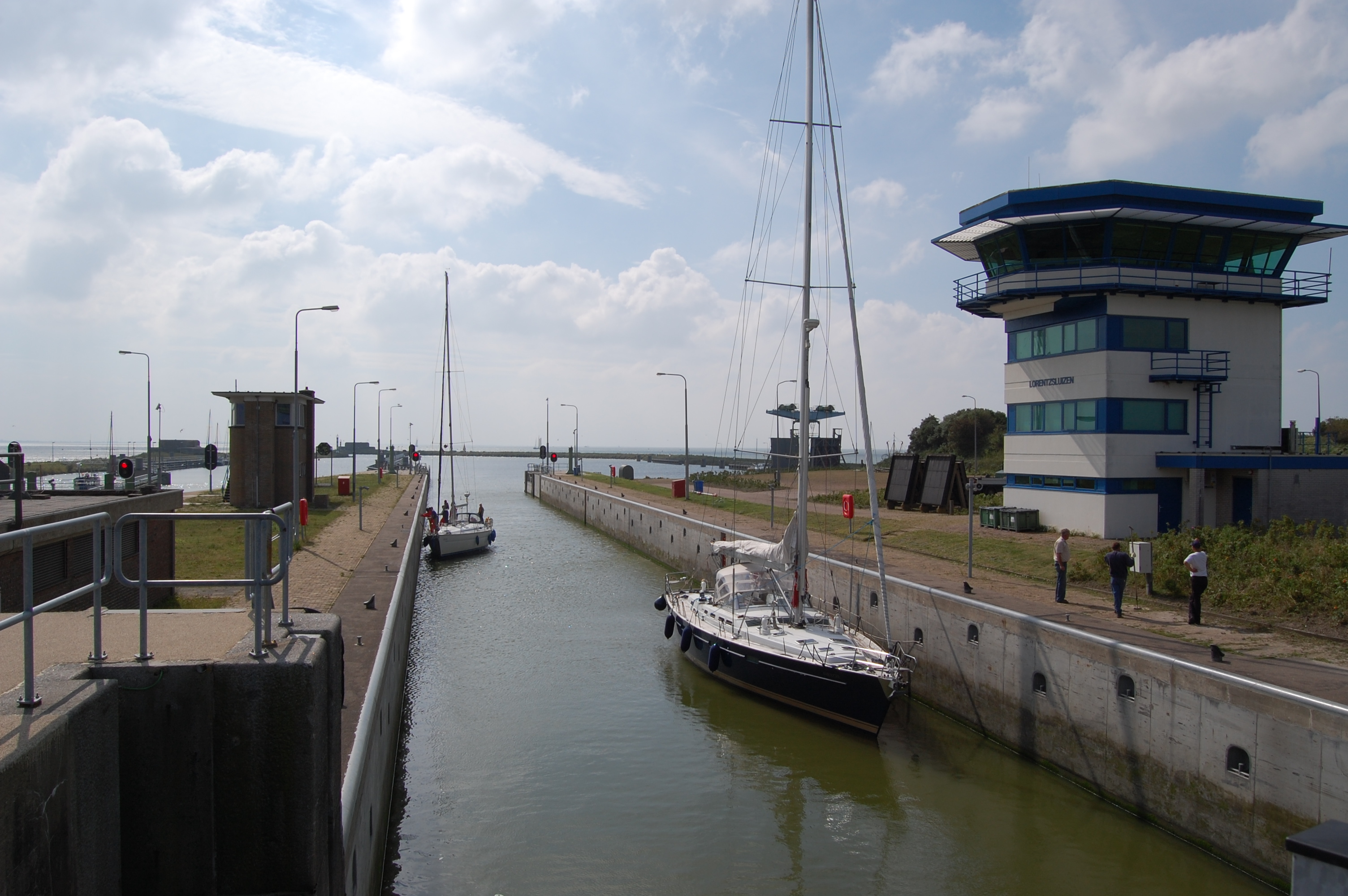 De Lorenzsluis in de Afsluitdijk die de verbinding maakt tussen het IJsselmeer en de Waddenzee.